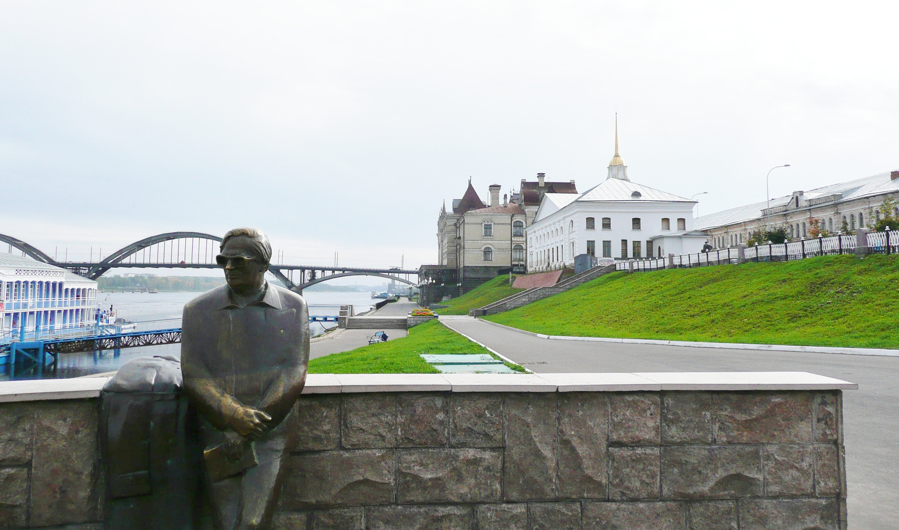 Statue of Lev Oshanin on Volga Embankment in Rybinsk